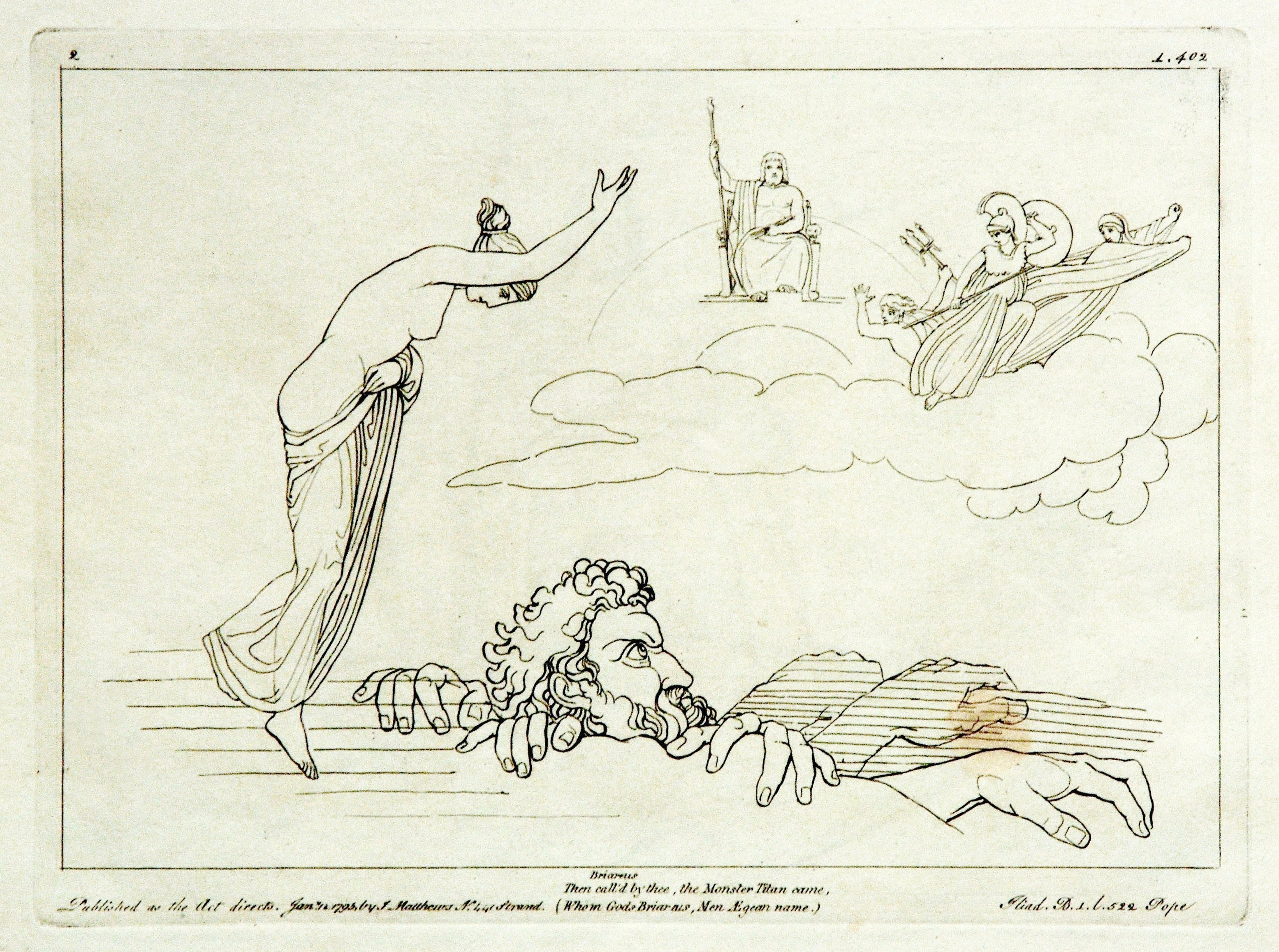 Kupferstich (1795) von Tommaso Piroli (1752 – 1824) nach einer Zeichnung (1793) von John Flaxman (1755 – 1826).